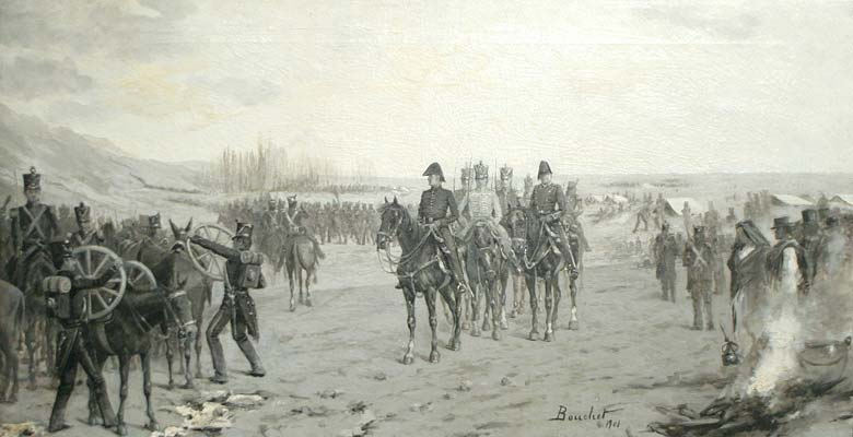 El Ejército de los Andes saliendo del campamento del Plumerillo. Boceto al óleo y dos tintas sobre tela; 116 x 60 cm. Museo Histórico Nacional, Buenos Aires